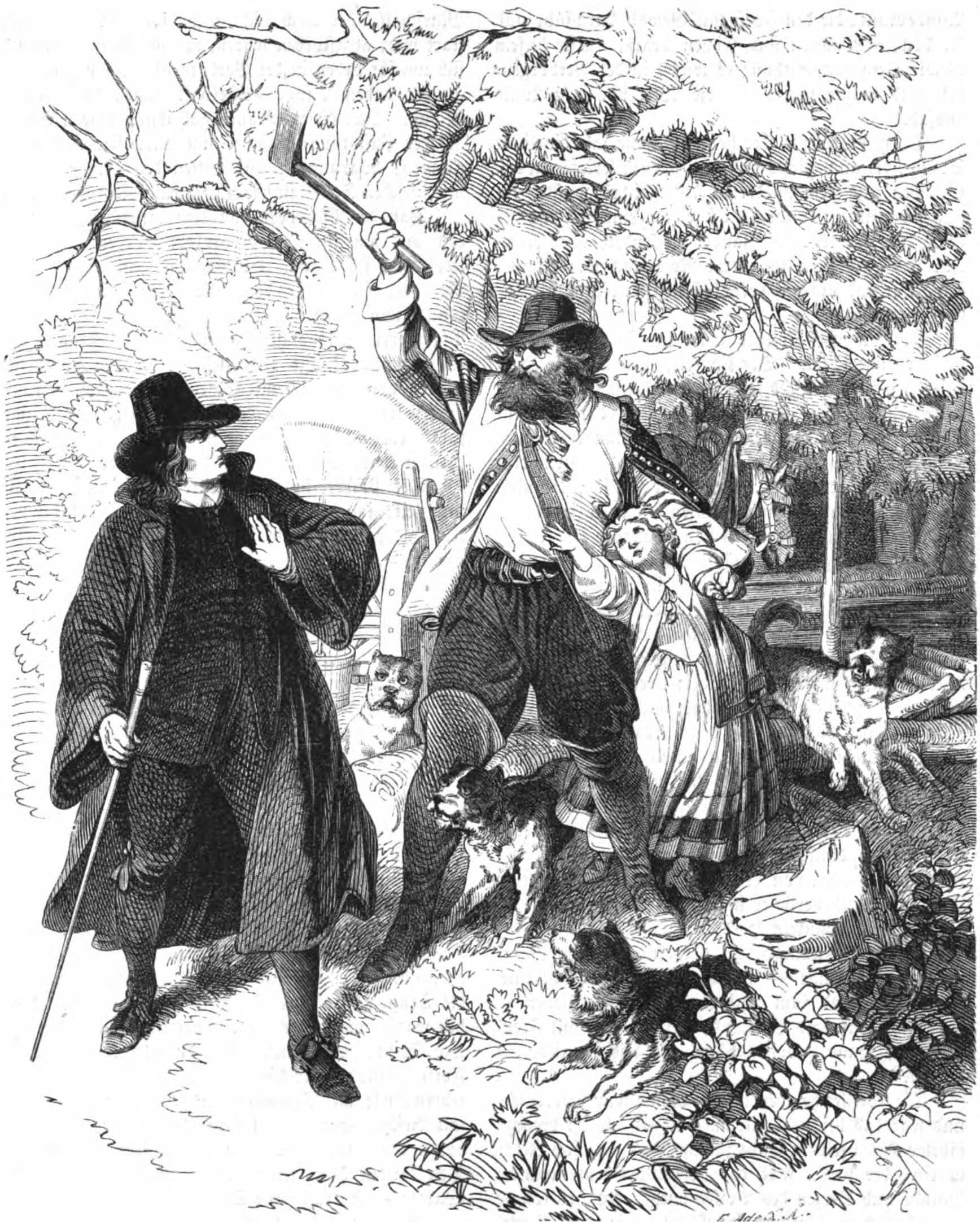 Szene "Begegnung im Walde" aus der Erzählung "Else von der Tanne" von Wilhelm Raabe.